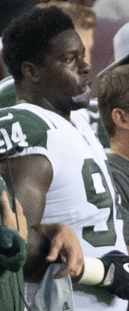 Jets at Redskins 8/16/18